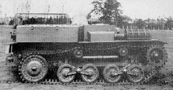 Japanese Type 98 So-Da personnel carrier